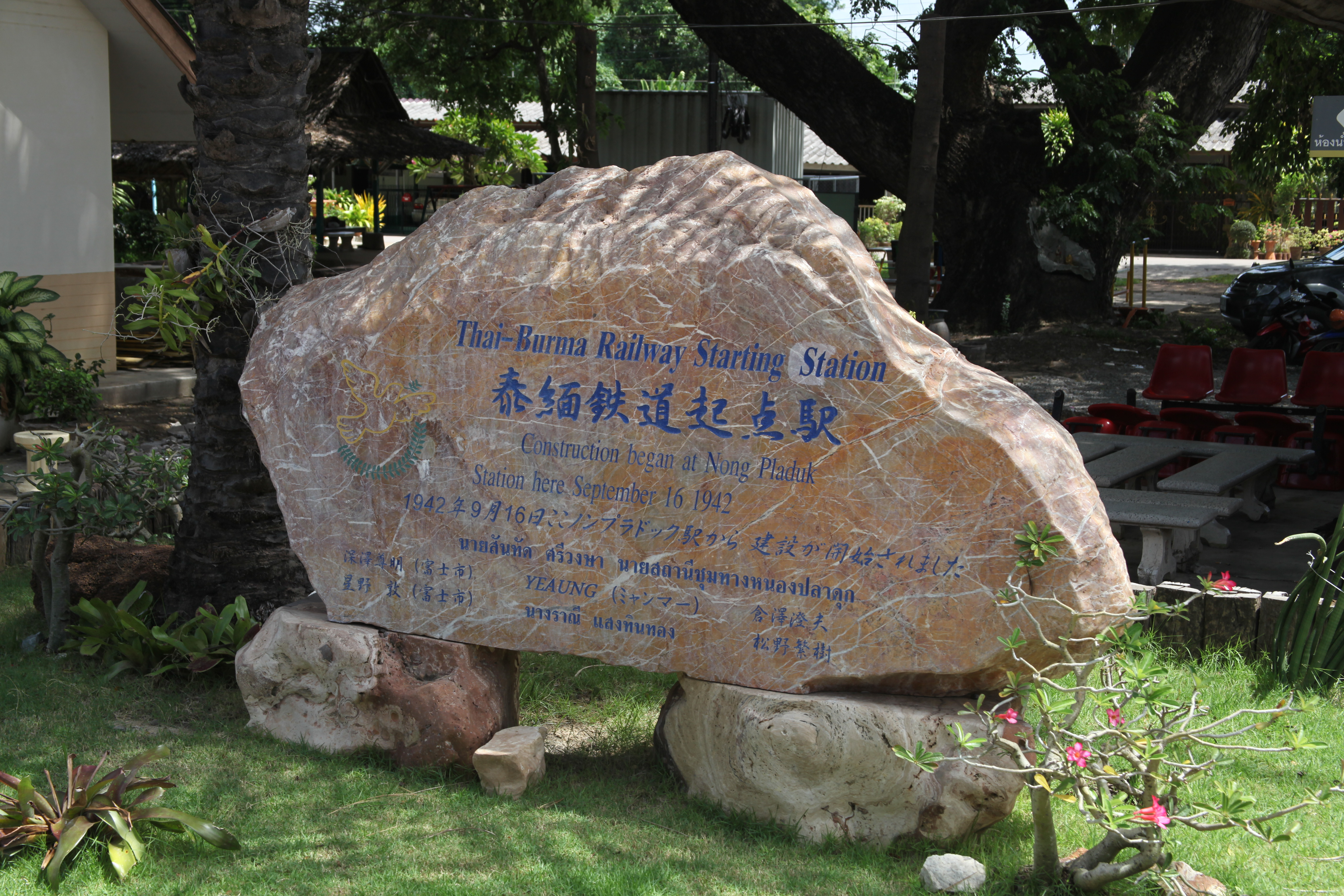 ノーンプラードゥック駅に設置されている泰緬鉄道の記念碑